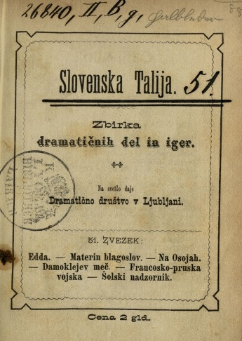 Naslovnica 51. zvezka Slovenske Talije